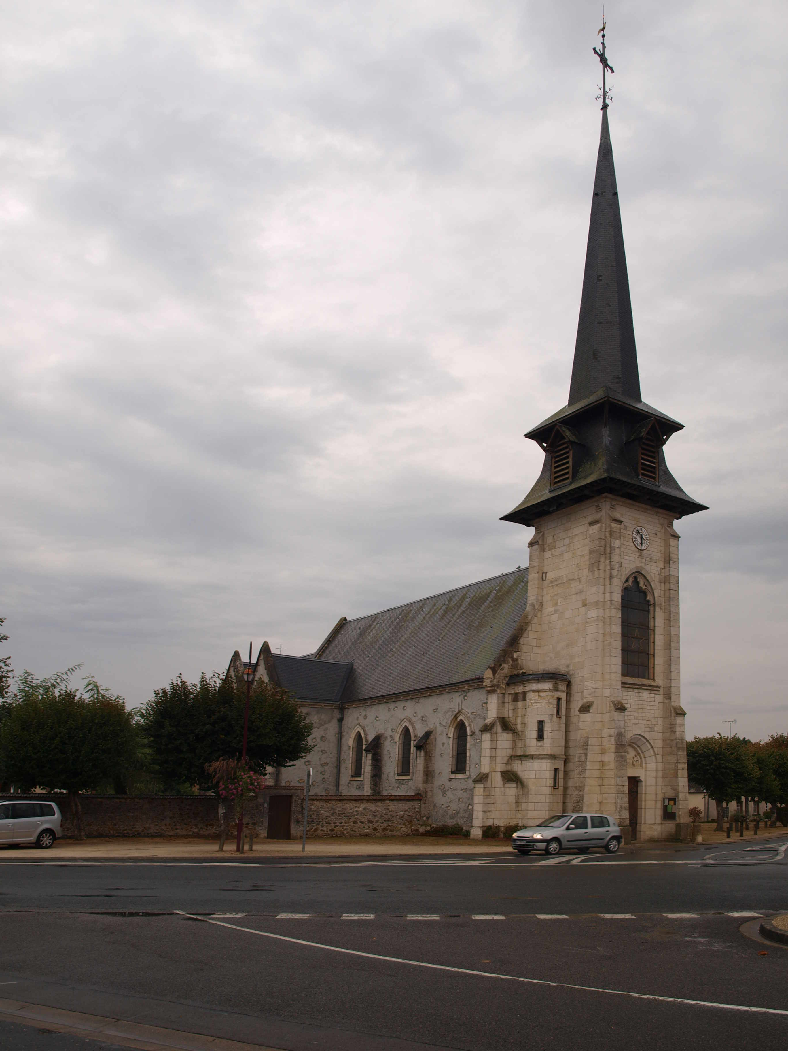 Vouzeron (Cher ; France) ; église.